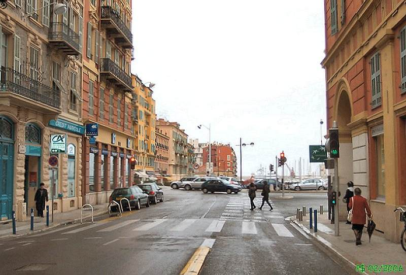 Nice - Quartiers de Nice Nice - Quartier du port Le bout de la rue Arson qui débouche sur le port. C'est par ici qu'on embarque vers la Corse. Photo 02/2006, il pleuvait. Orientation Sud